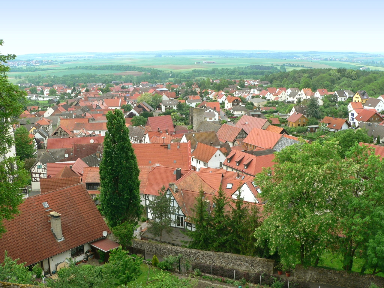 Ortsansicht von Münzenberg, Hessen, Germany